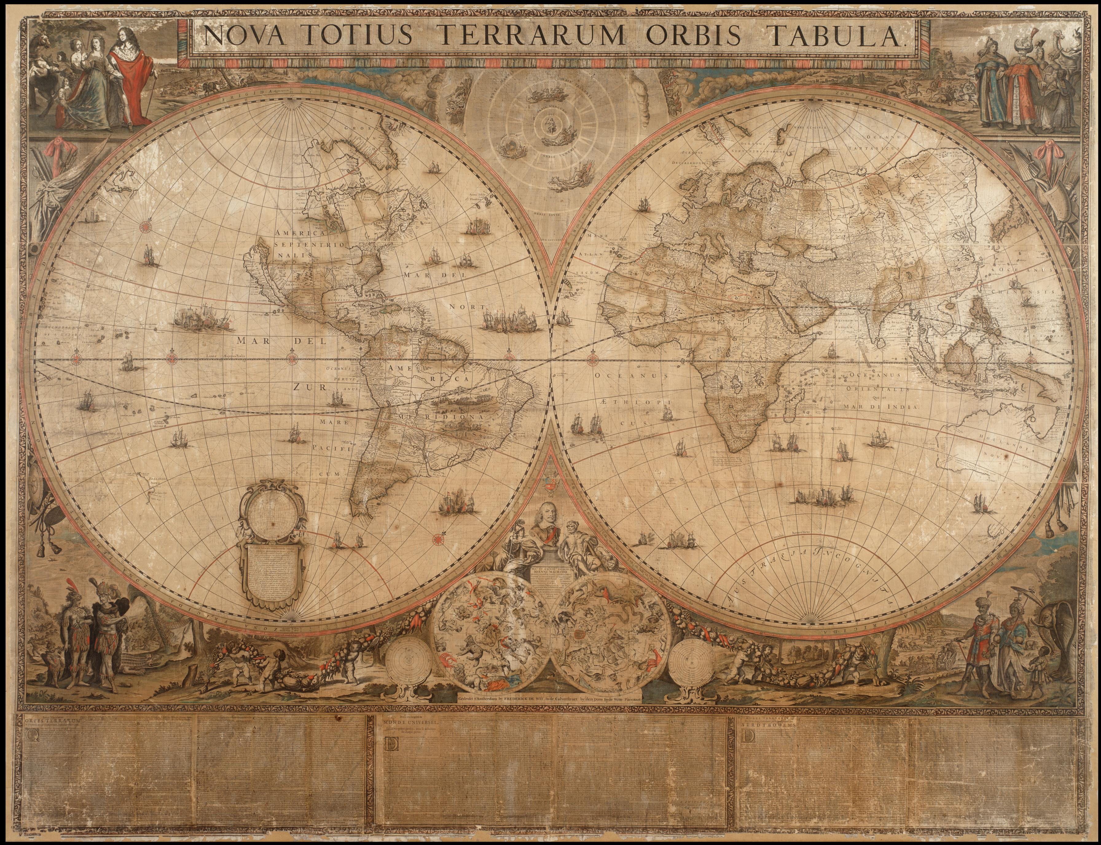 12 bladige wandkaart 128x193,5cm